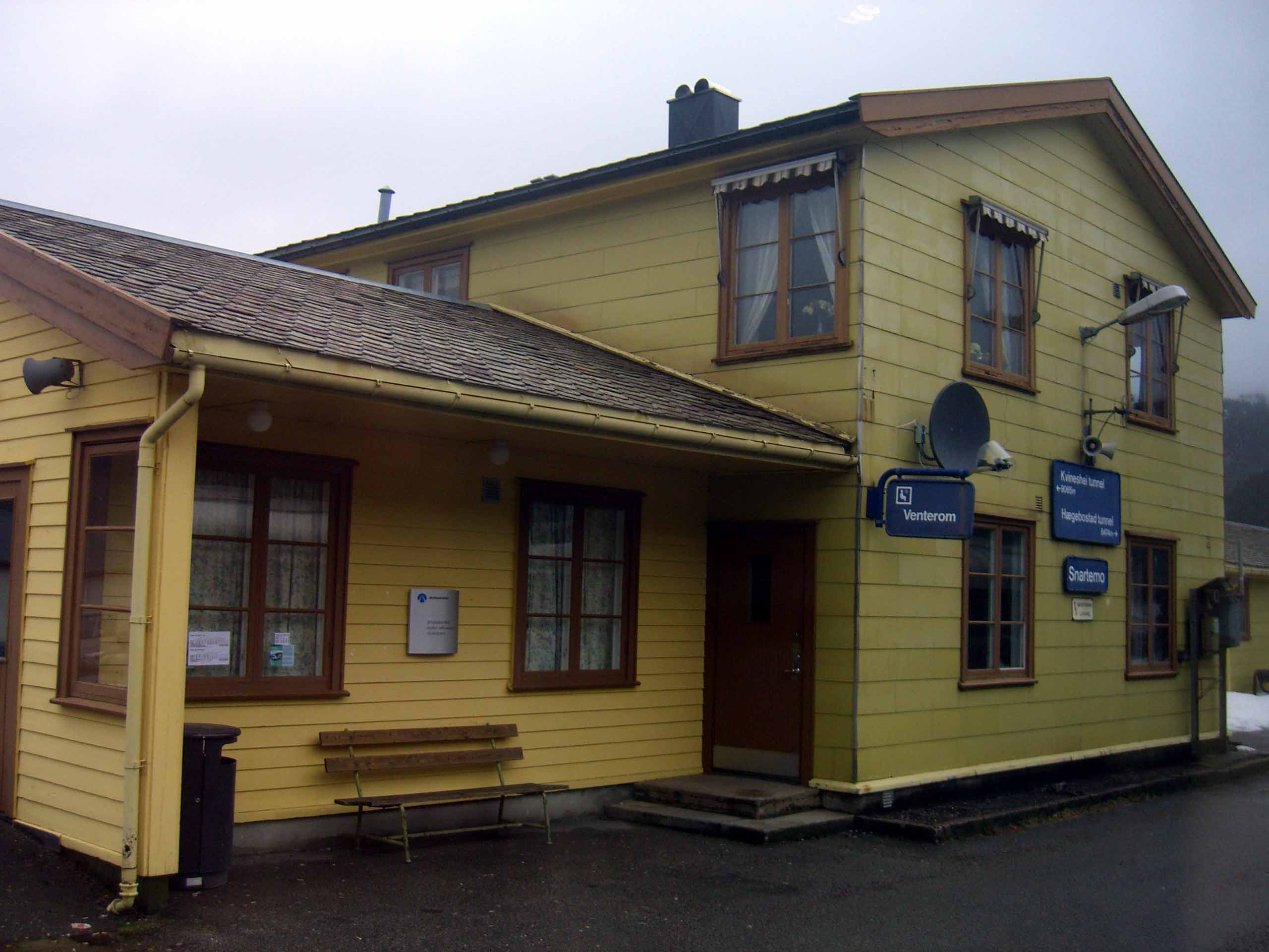 Snartemo Station on Sørlandsbanen, in Hægebostad, Norway